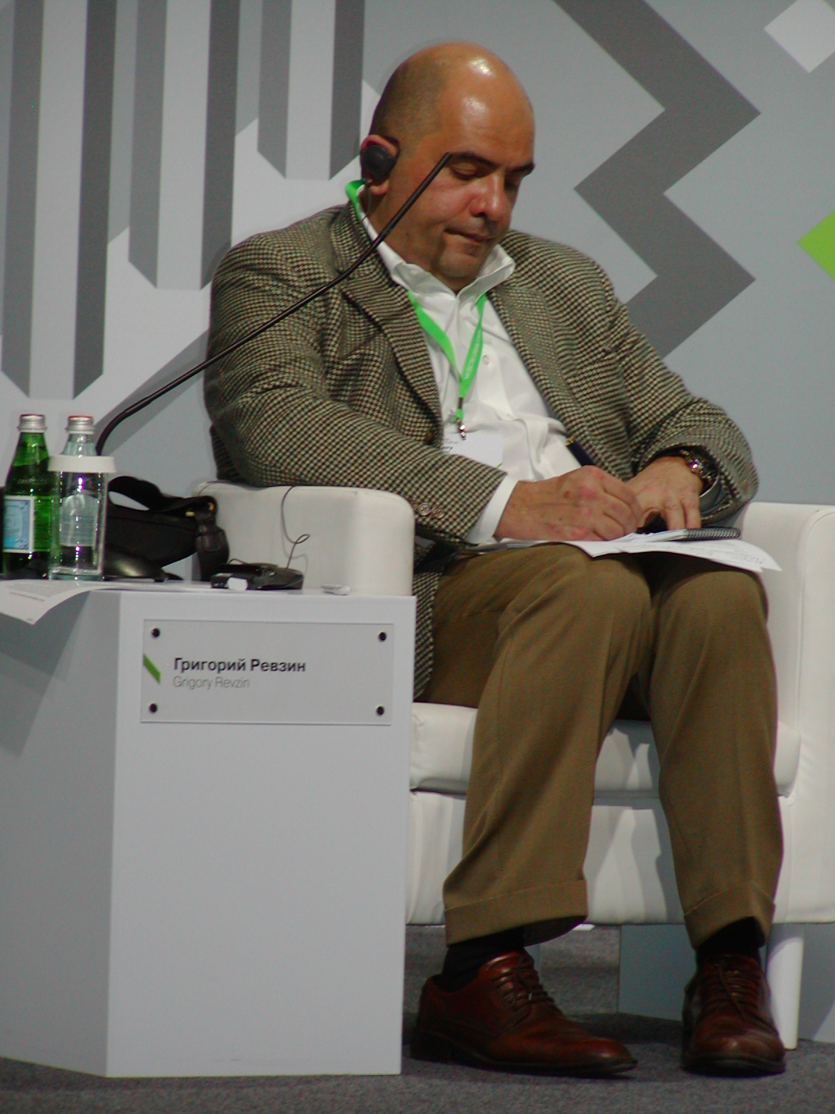 Григорий Ревзин на 2-м Московском урбанистическом форуме 5 декабря 2012 года.